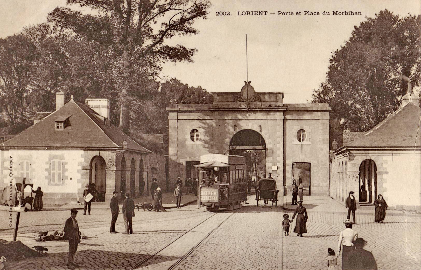 Carte postale ancienne éditée par Collection Villard à Quimper, n°2002 : LORIENT - Porte et Place du Morbihan.Au centre, rame du tramway de Lorient